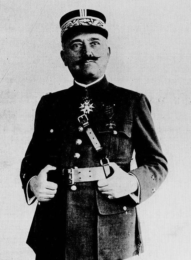 Le général Joseph-François Poeymirau en 1919